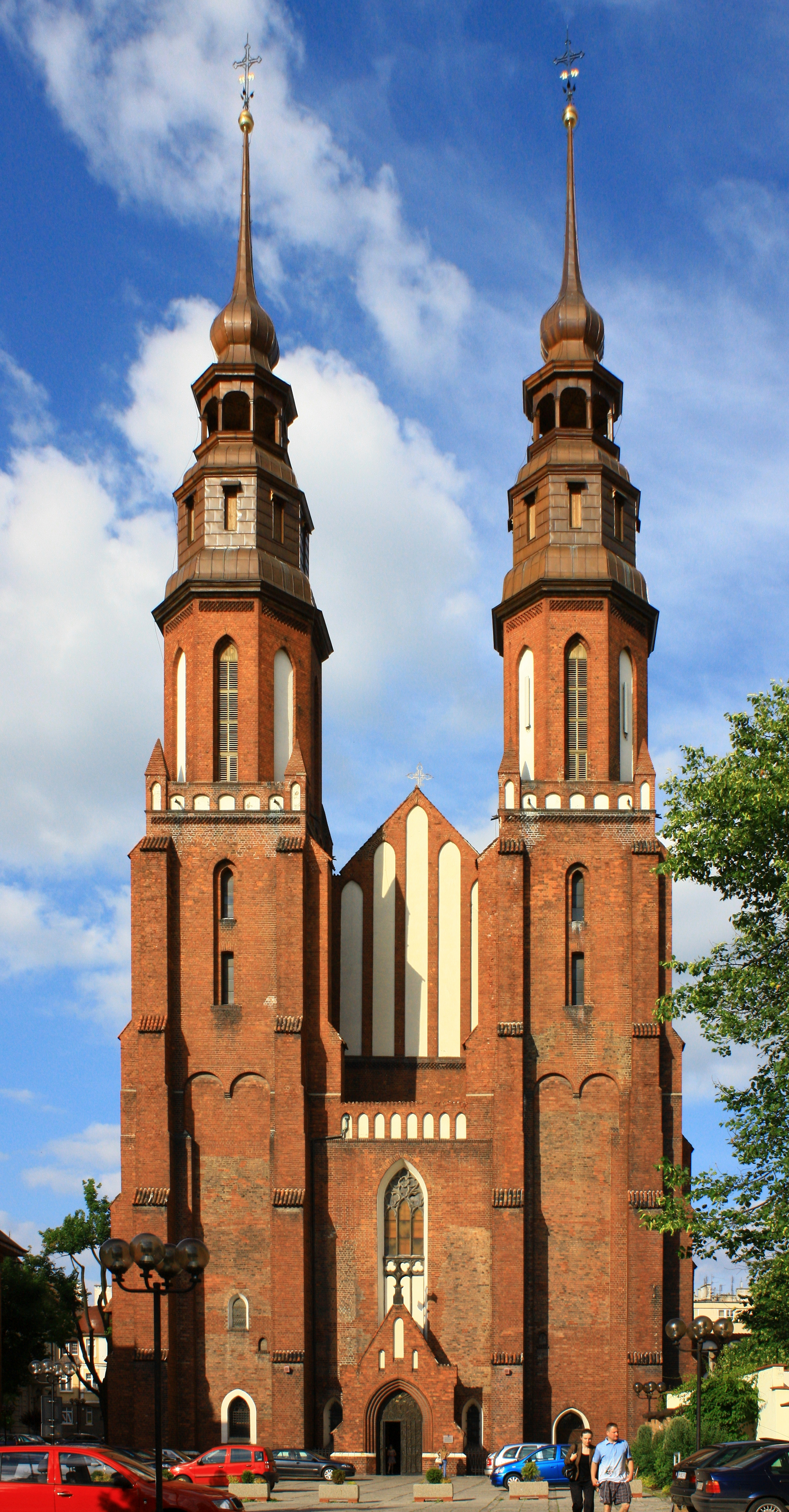 Opole, kościół katedralny p.w. Św. Krzyża, XV, 1889